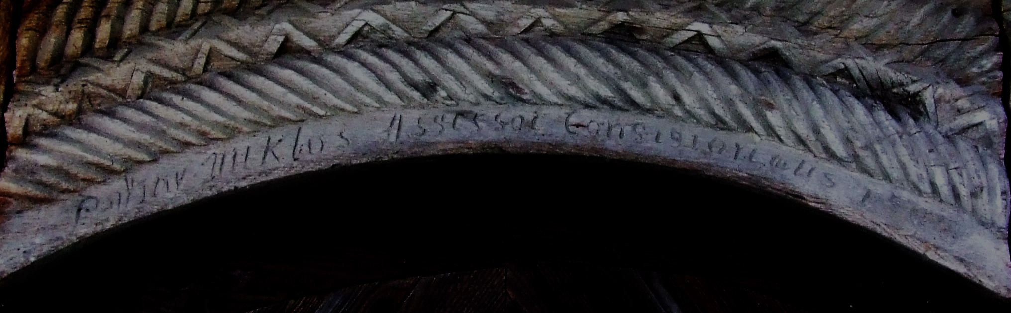 Biserica de lemn din Peştiş, judeţul Bihor. Inscripţie.